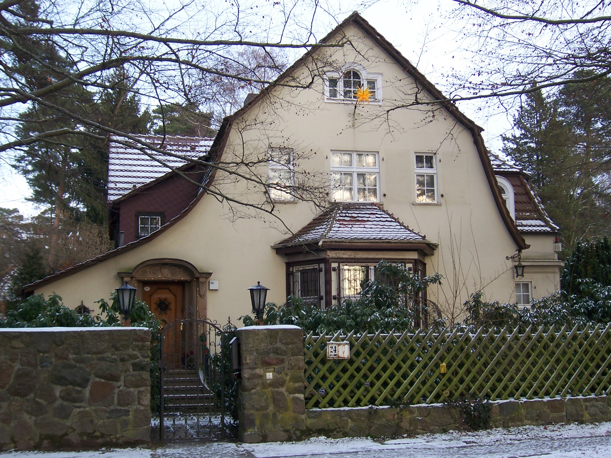 Kulturdenkmal Berlin Frohnau Im Amseltal 24